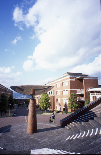 shotman（私）が撮影した写真です University of Shizuoka, 静岡県立大学